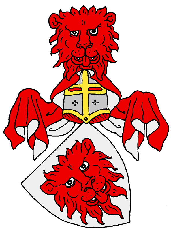 Stammwappen derer von Kahlden, rote Linie.